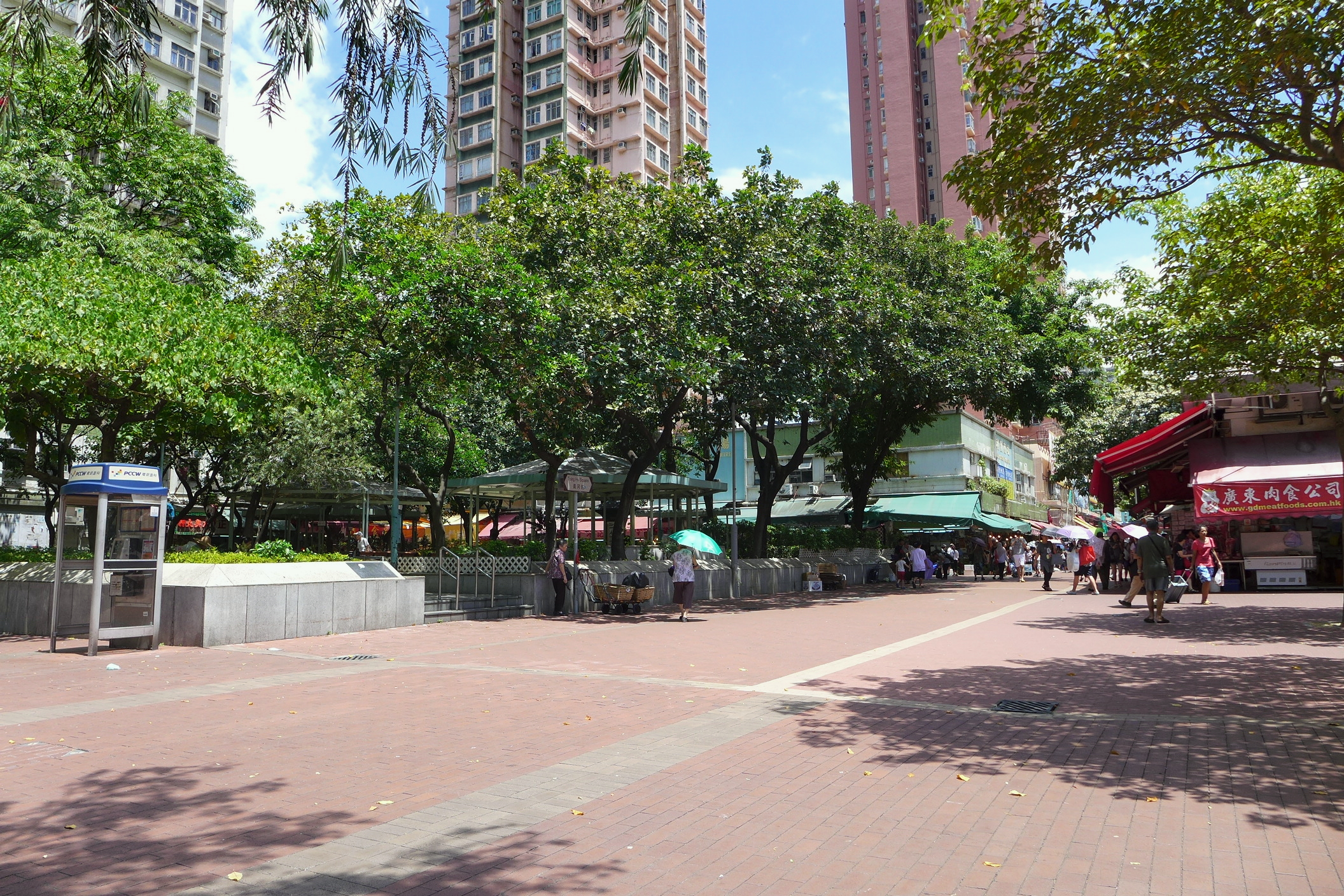 Tsing Shan Square